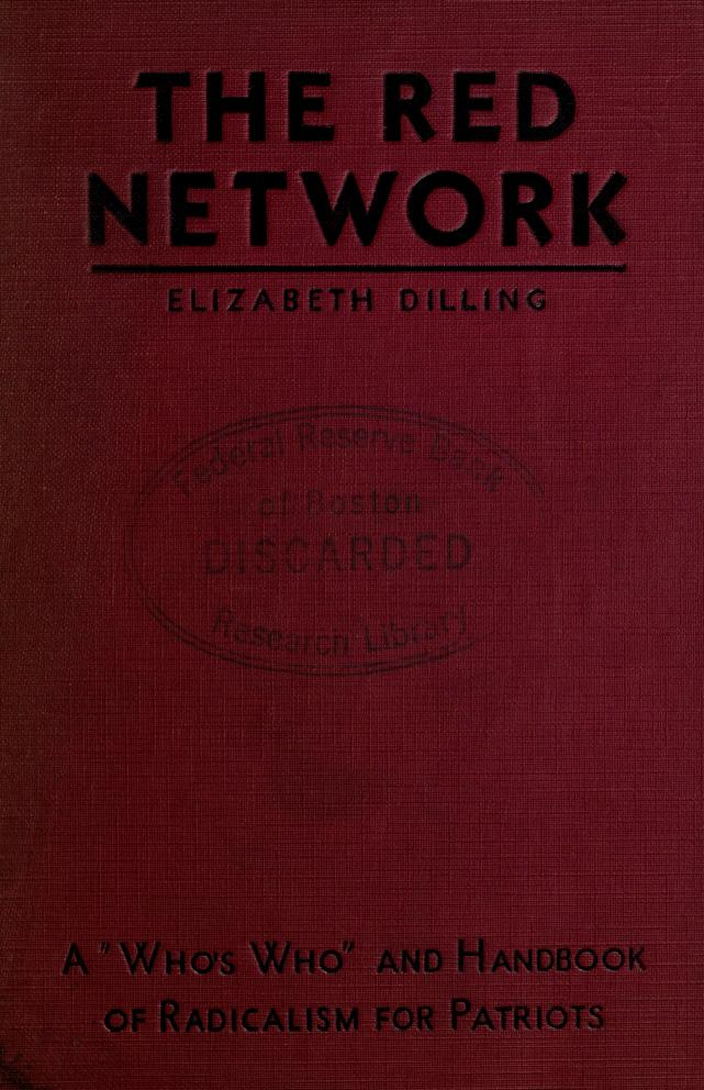 Portada de The Red Network; A "Who's Who" and Handbook of Radicalism for Patriots, obra de Elizabeth Dilling.